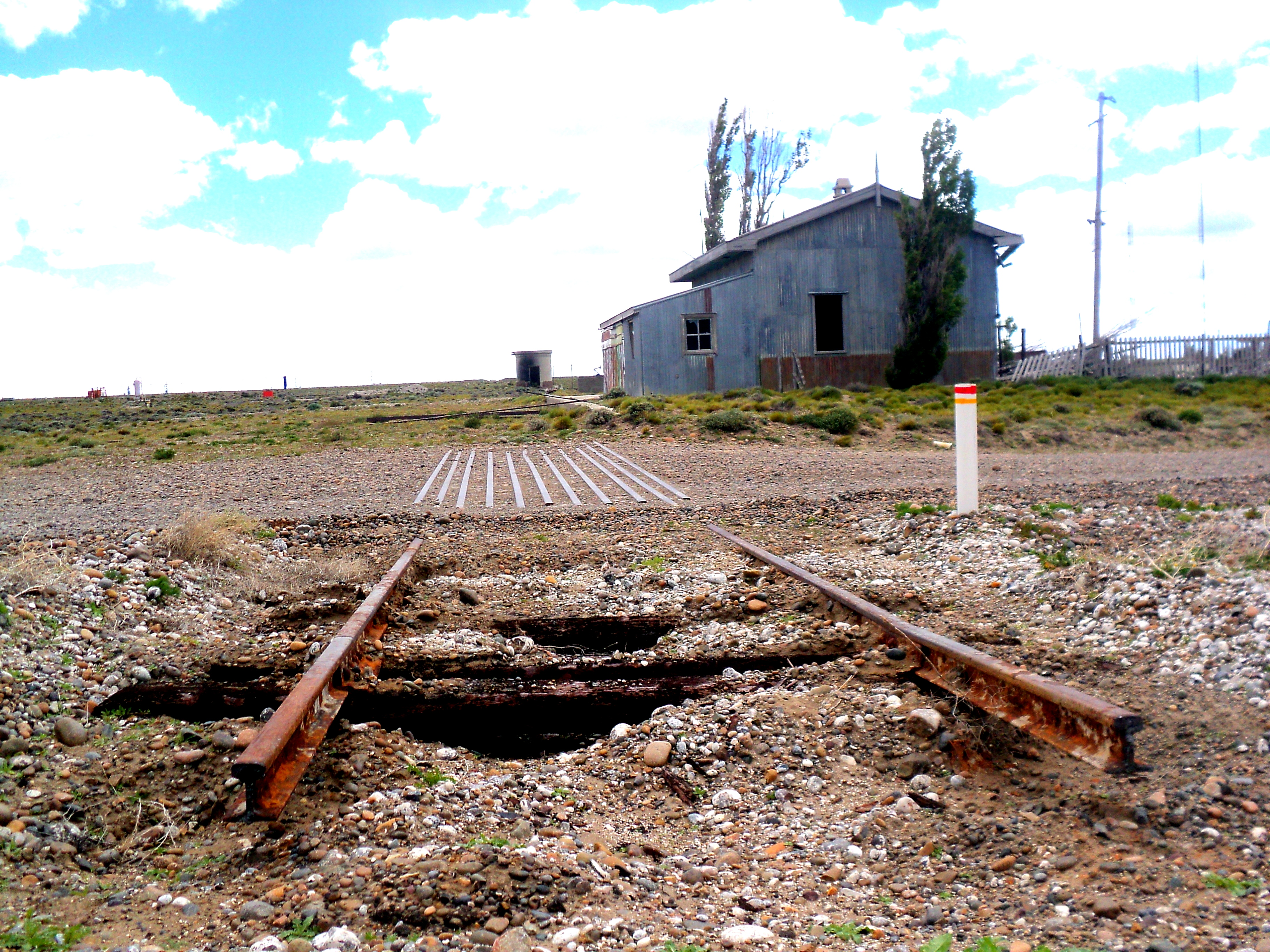 La estación Pampa del castillo un trama de vías que aun sobrevive en sus cercanìas. Tambièn sobreviven lso arboles plantados por los ferroviarios